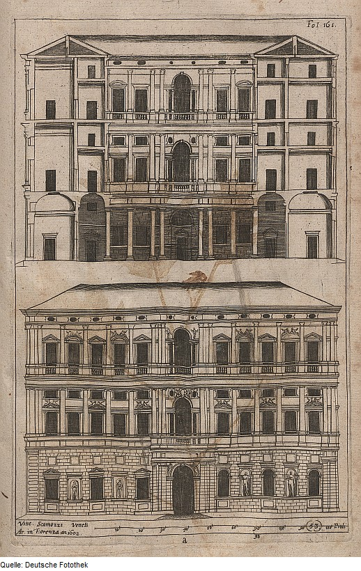 Original image description from the Deutsche Fotothek Architektur & Wohnhaus & Profanbau & Palast & Palazzo & Rustika & Mezzanin